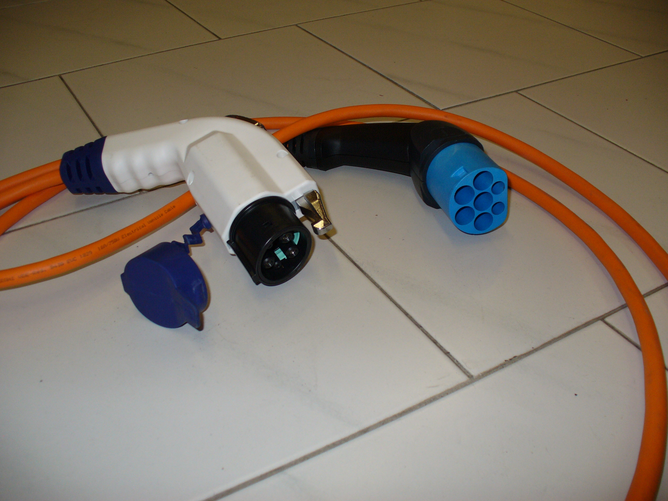 Ladekabel Mennekes Stecker Typ2, 16A oder 32A, an 400V Drehstrom